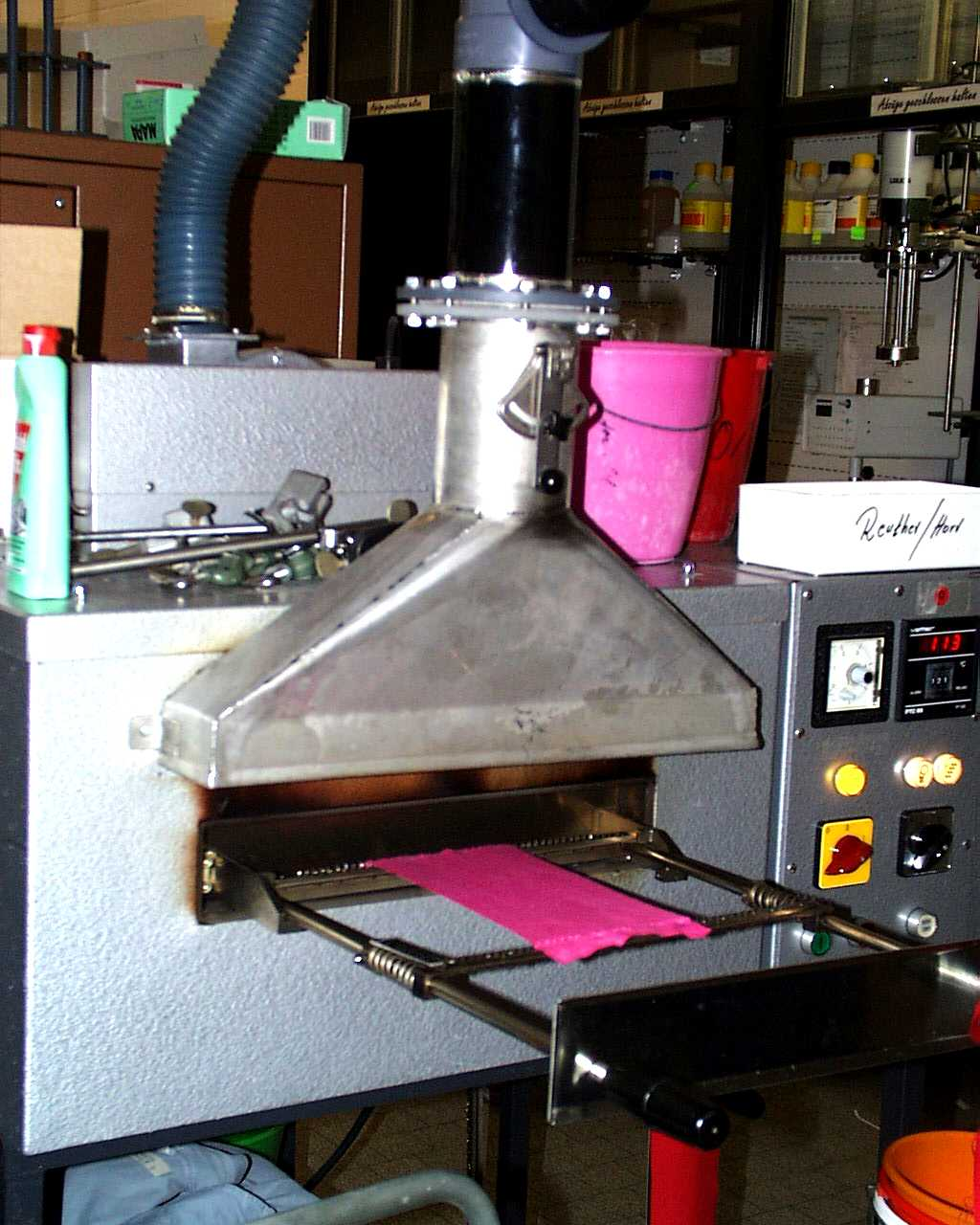 Laborspannrahmen mit Absaugung und eingespannter Probe zum Trocknen.